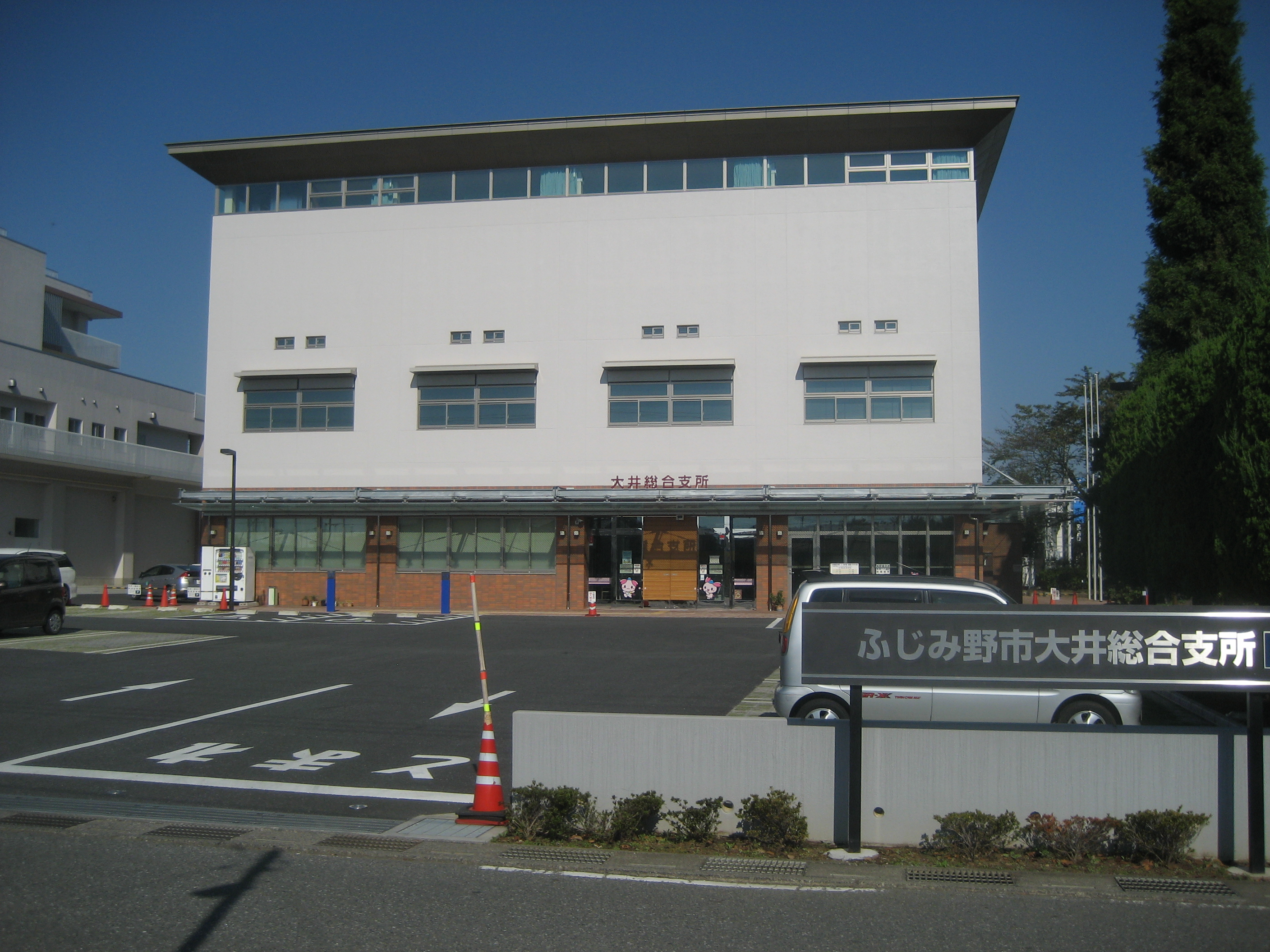 埼玉県ふじみ野市役所大井総合支所（建物南側を撮影）